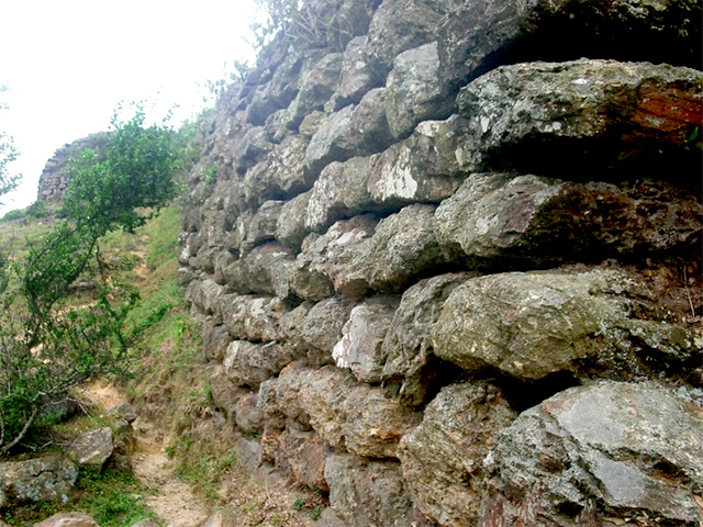 Bức tường thành đắp bằng đá đi lên đỉnh núi.